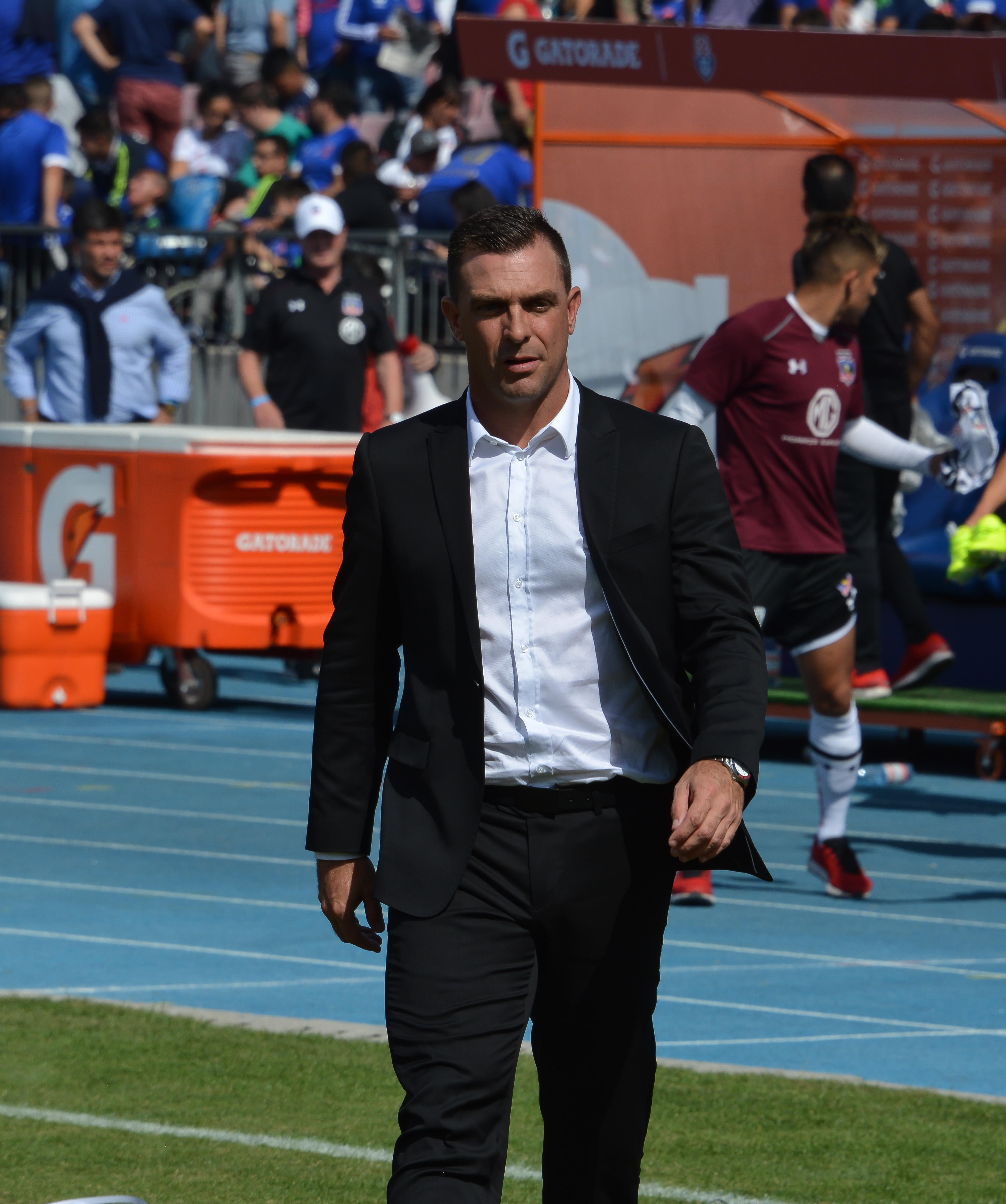 Universidad de Chile v Colo-Colo, Estadio Nacional, Santiago, Chile.